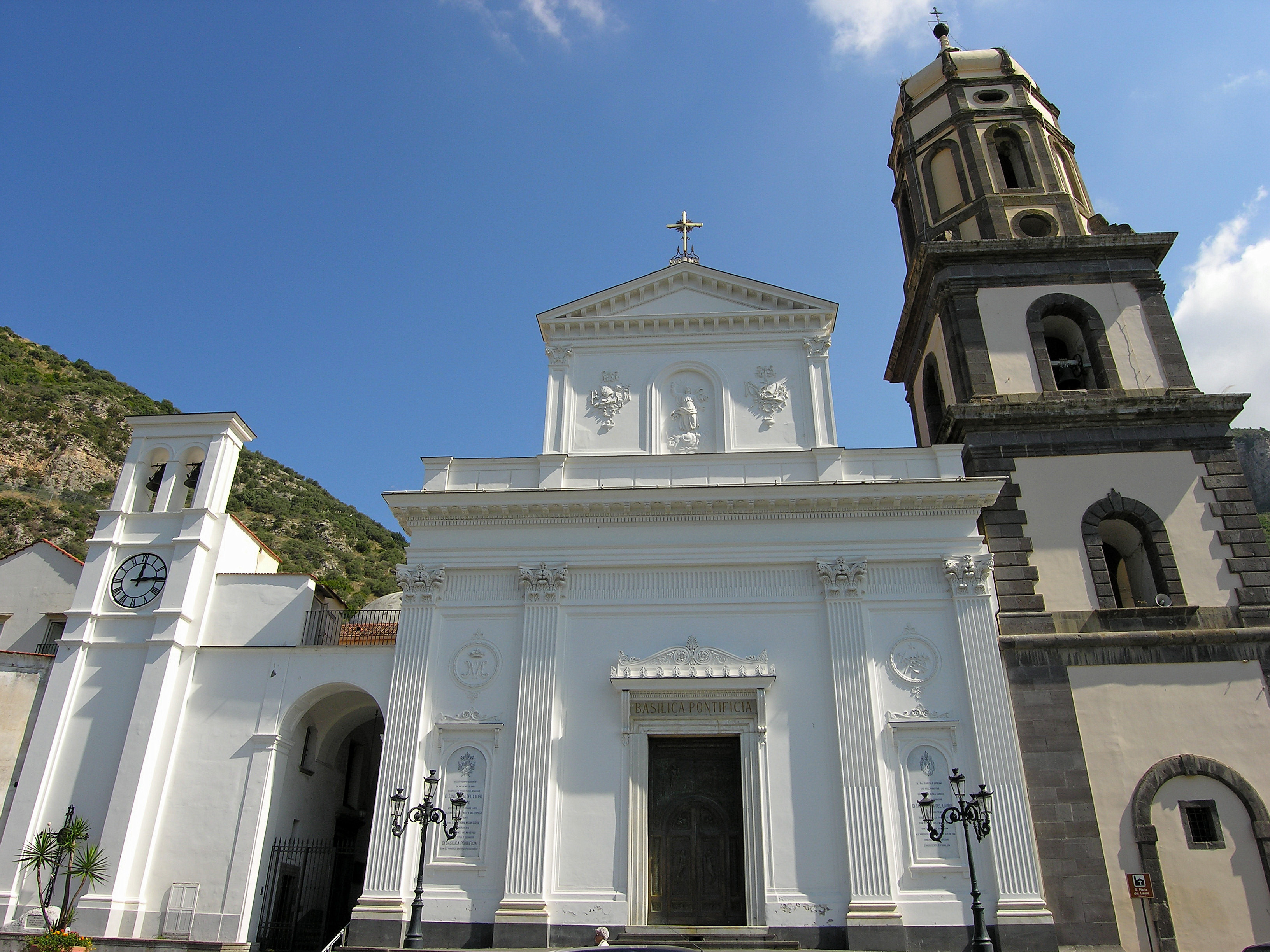 Facciata e campanile della Basilica Santa Maria del Lauro in Meta (NA), Italy